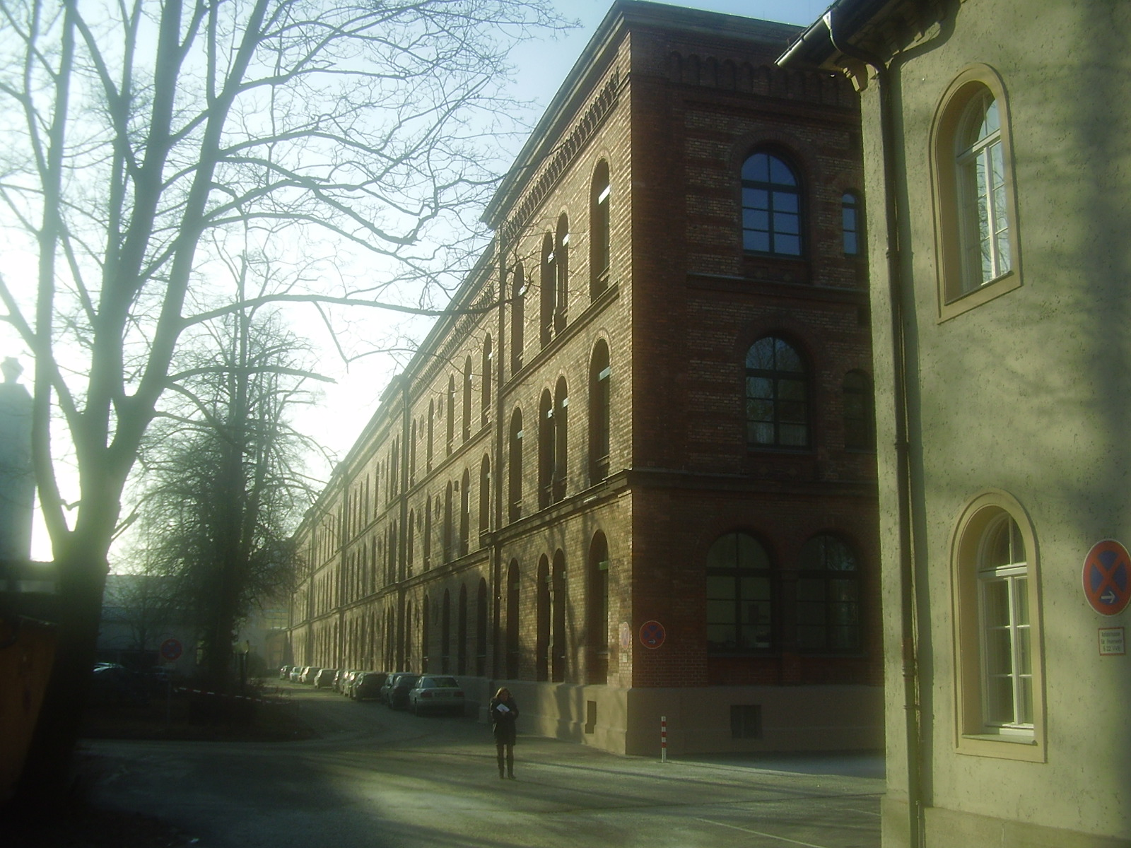 Ostflügel des ehemaligen Militärlazaretts in München, Lazarettstraße